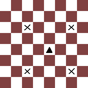 Moviment de la peça triangular del joc de tauler ritmomàquia